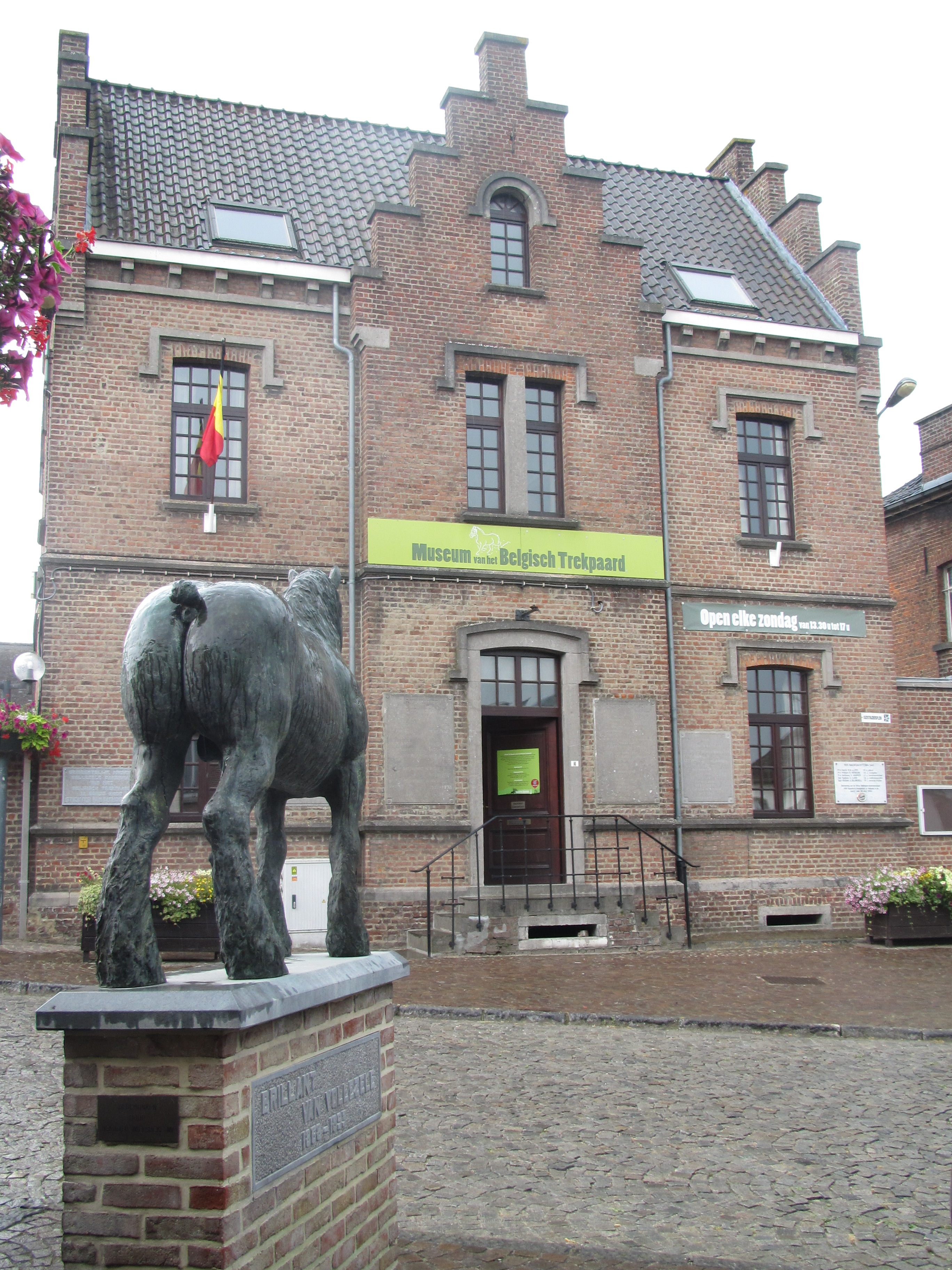 Zicht op het Museum van het Belgisch Trekpaard, gelegen aan het Oudstrijdersplein 4 te 1570 Vollezele, met op de voorgrond het standbeeld van het Belgisch trekpaard Brillant (1868-1893)